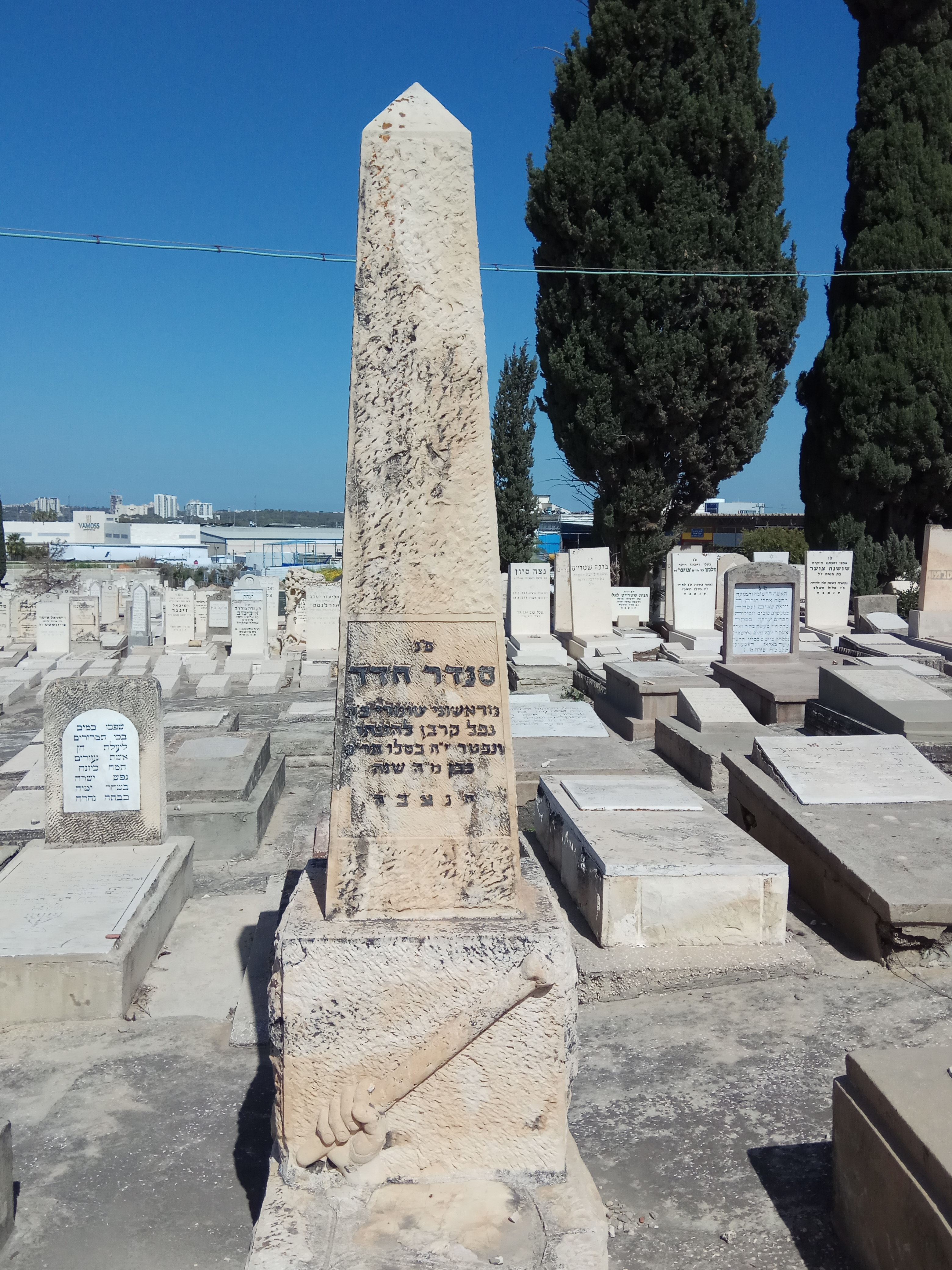 מצבת סנדר חדד בבית הקברות סגולה בפתח תקוה